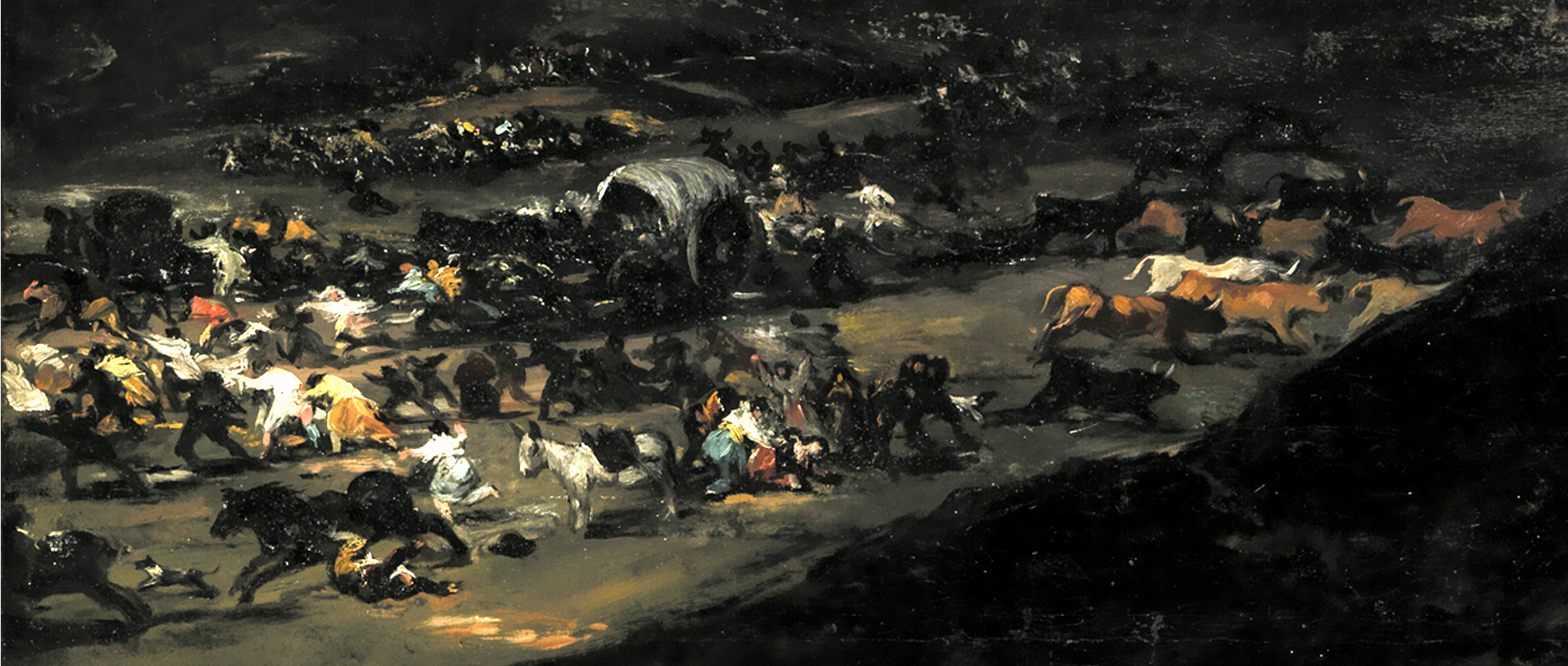 Detalle de El coloso, de Goya